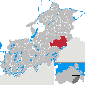 Woldegk in Mecklenburg-Vorpommern, Landkreis Mecklenburg-Strelitz